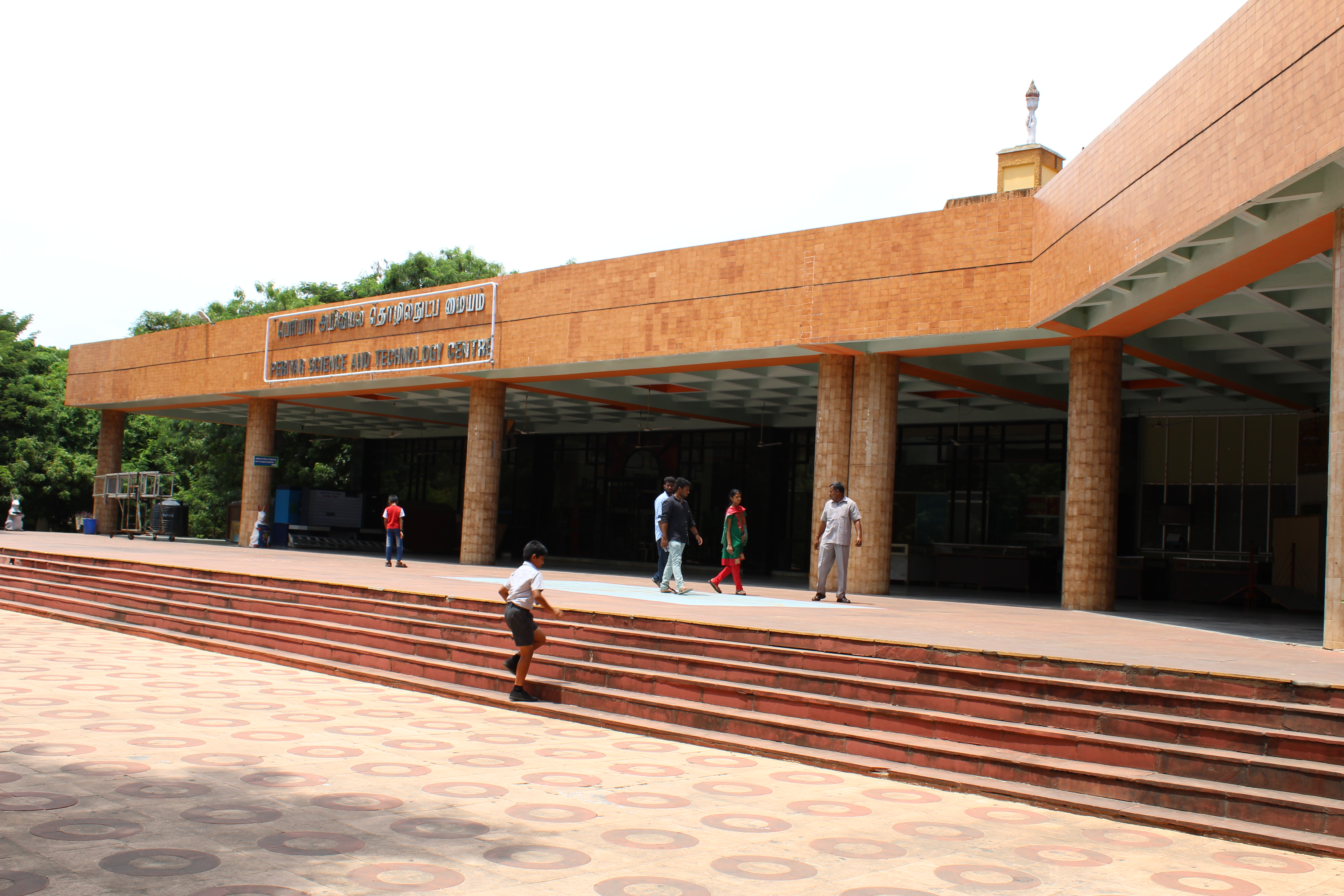 Periyar Science and Technology Centre and Birla Planetarium, Chennai